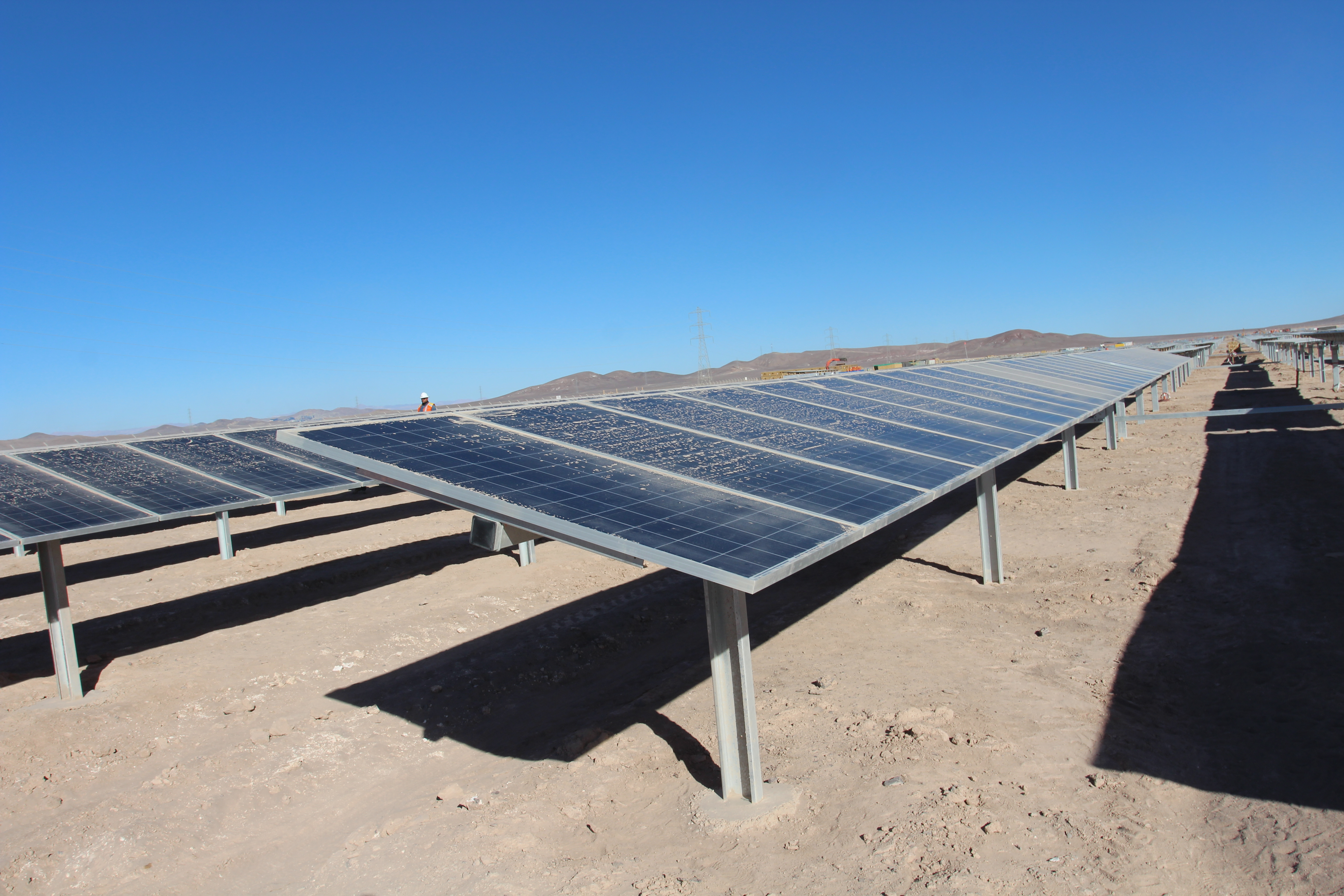 Visita Planta Abengoa